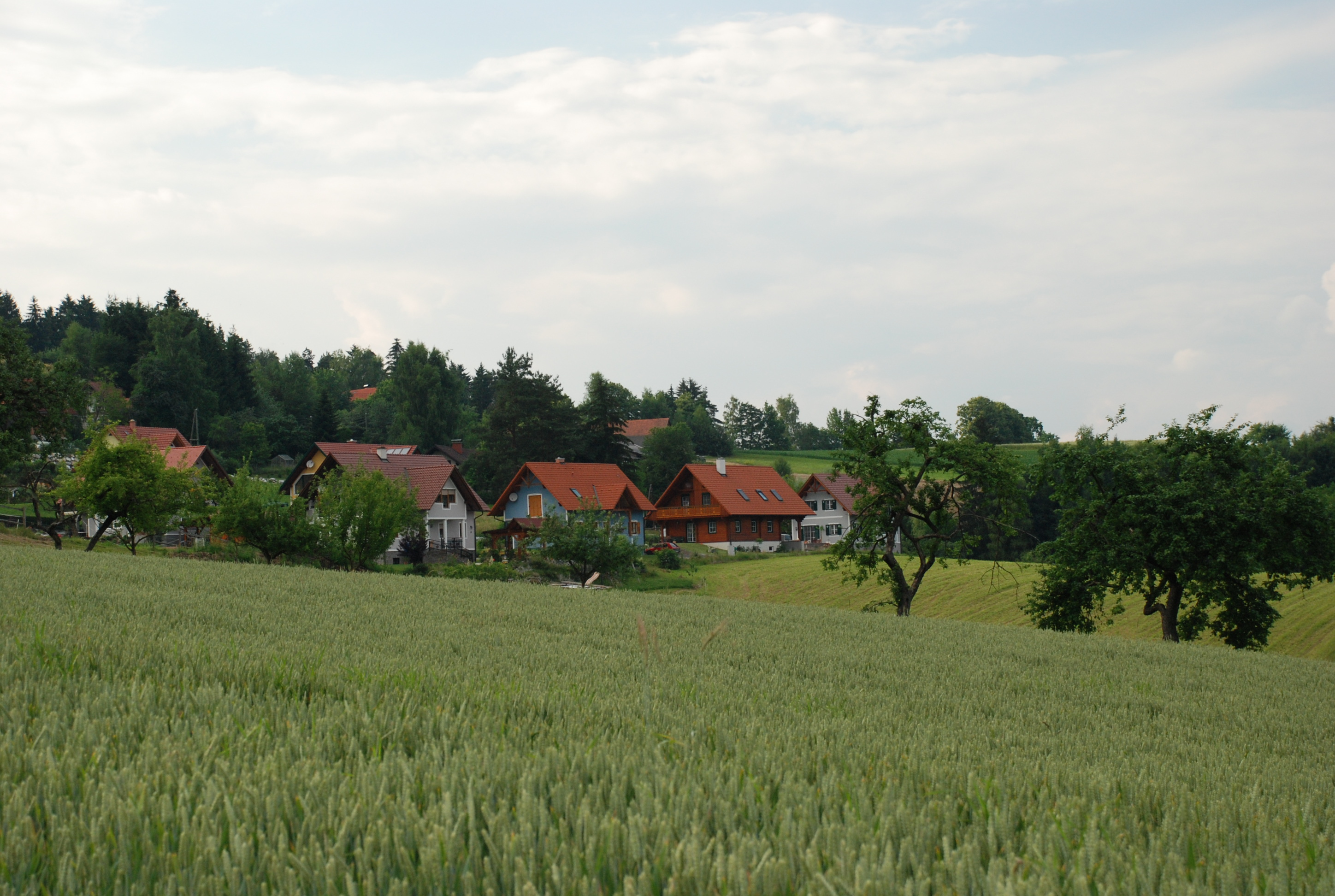 Im Einzugsgebiet der Laßnitz